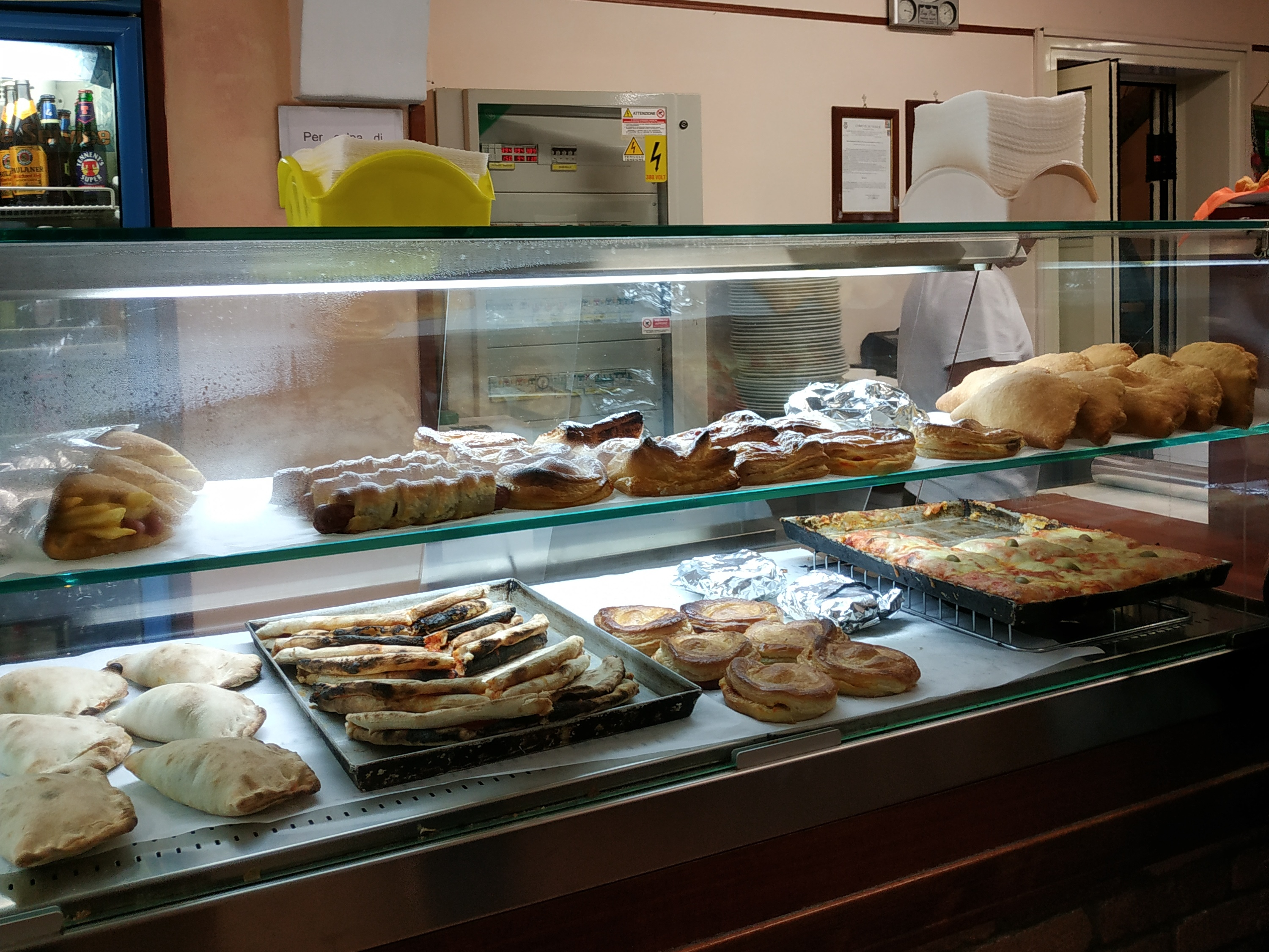 Vetrina rosticceria salentina